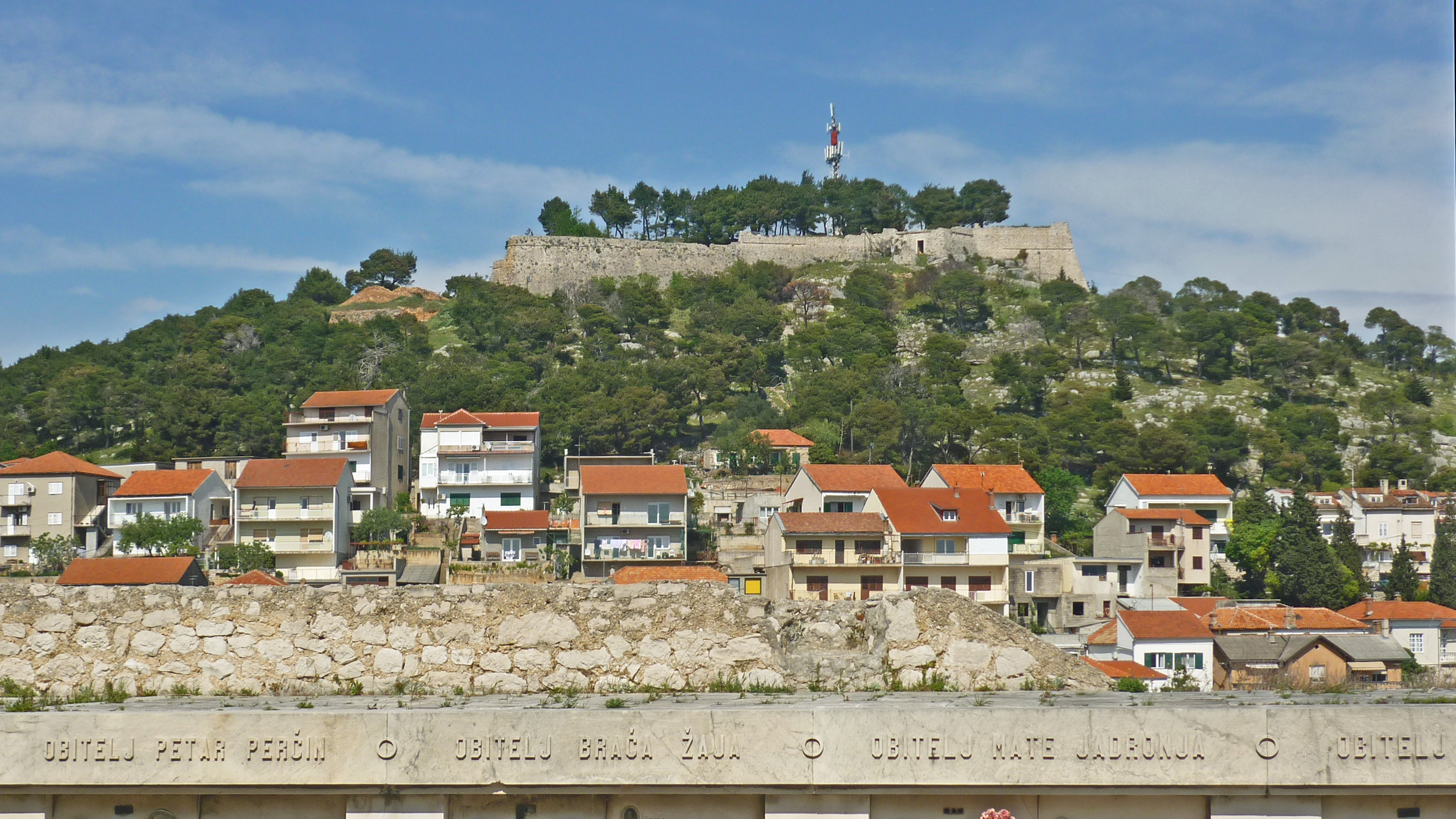 Ivan-Festung in Šibenik (dt.: Sibenning, ital.: Sebenico)